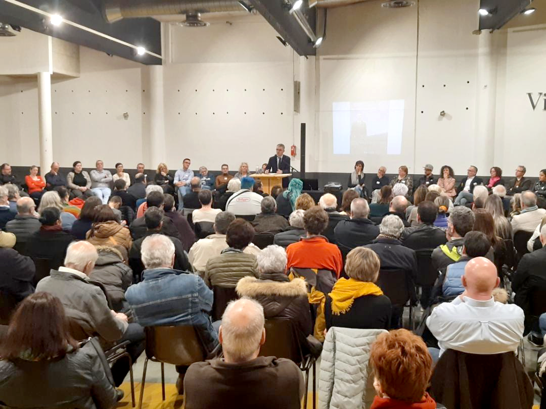 Stéphane Rodier et le groupe Génération Thiers lors d'une rencontre publique à la salle Espace, le 12 mars 2020.